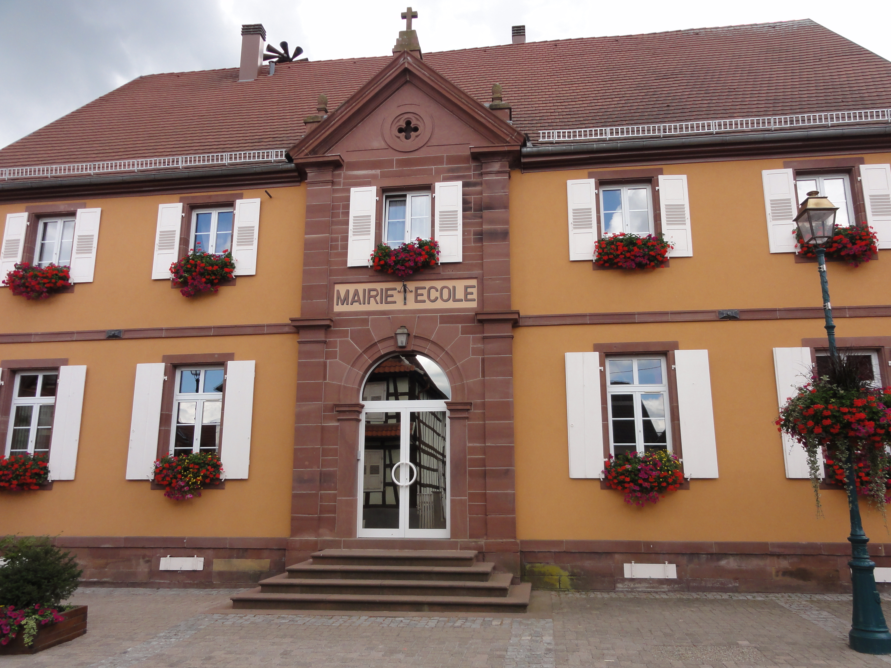 Alsace, Bas-Rhin, Froeschwiller, Mairie-école (XIXe).